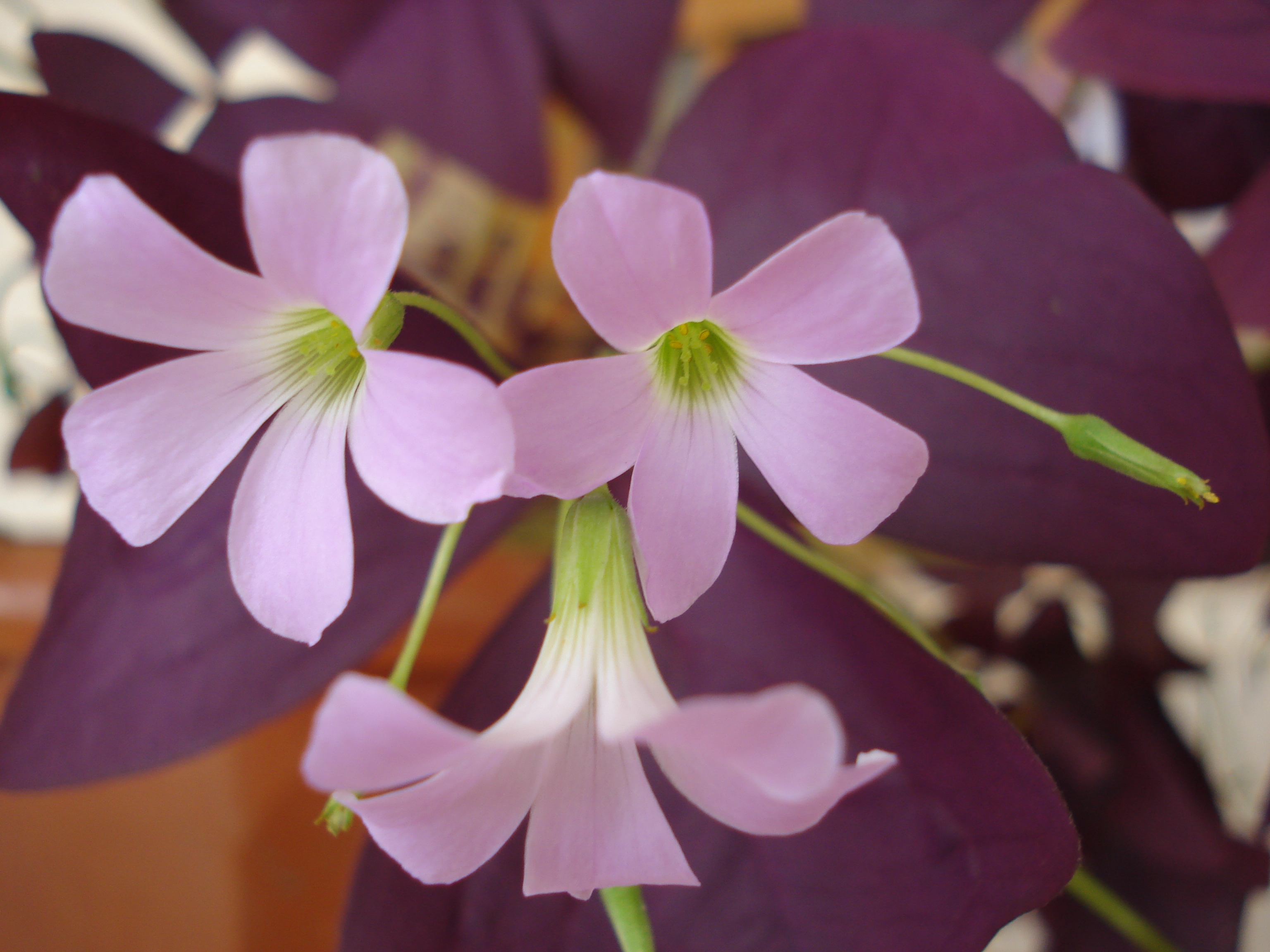 പേരറിയില്ല...